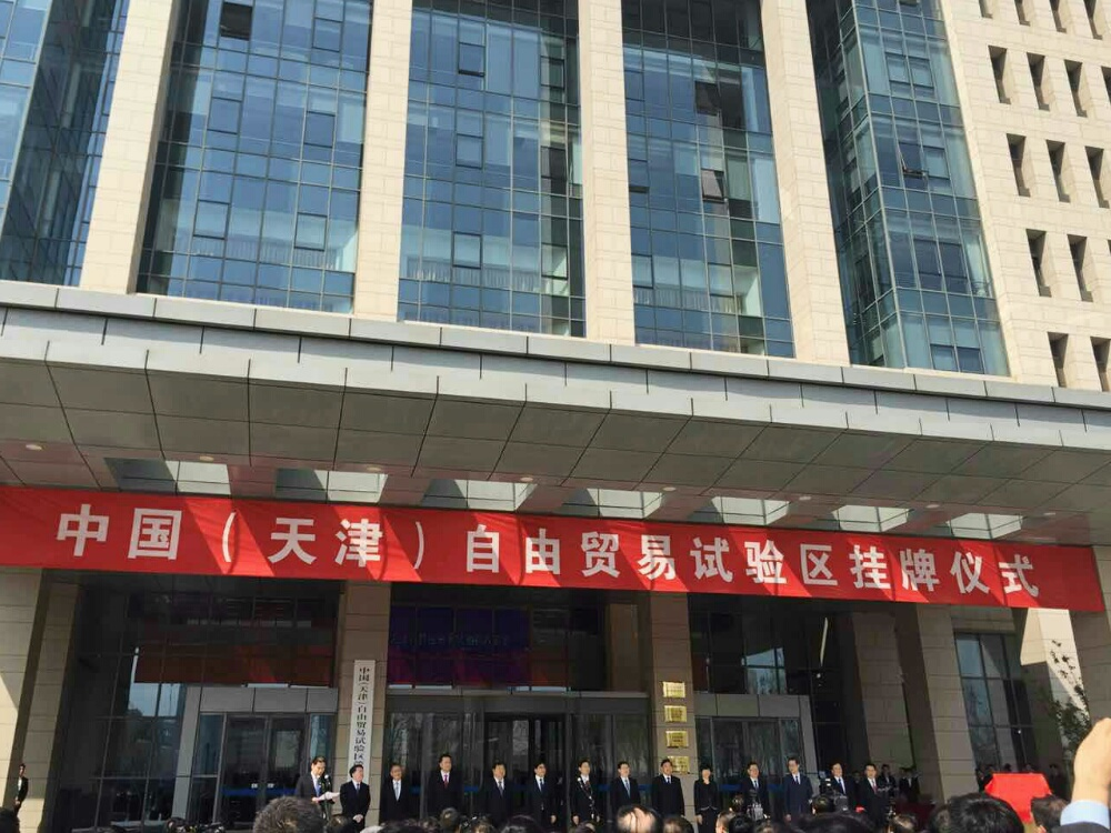 天津自贸区挂牌仪式